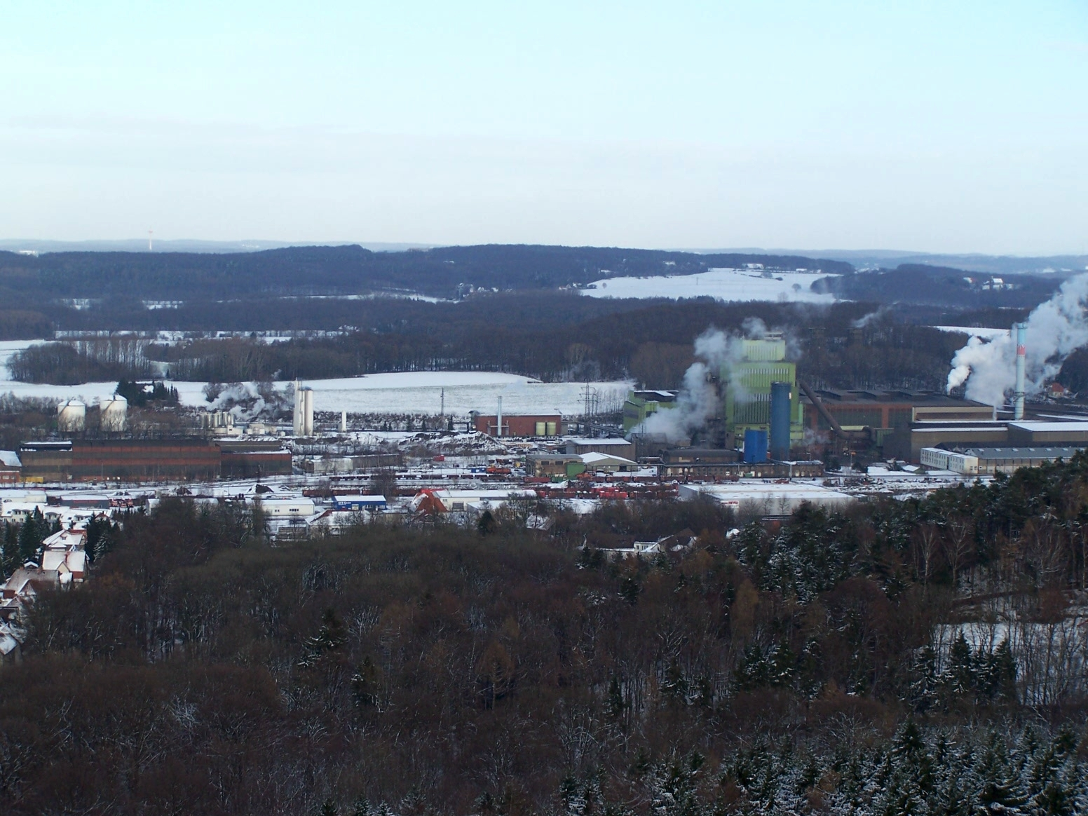 Stahlwerk Georgsmarienhütte im Winter